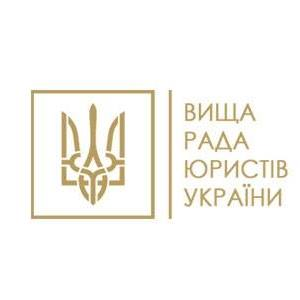 емблема ВРЮУ